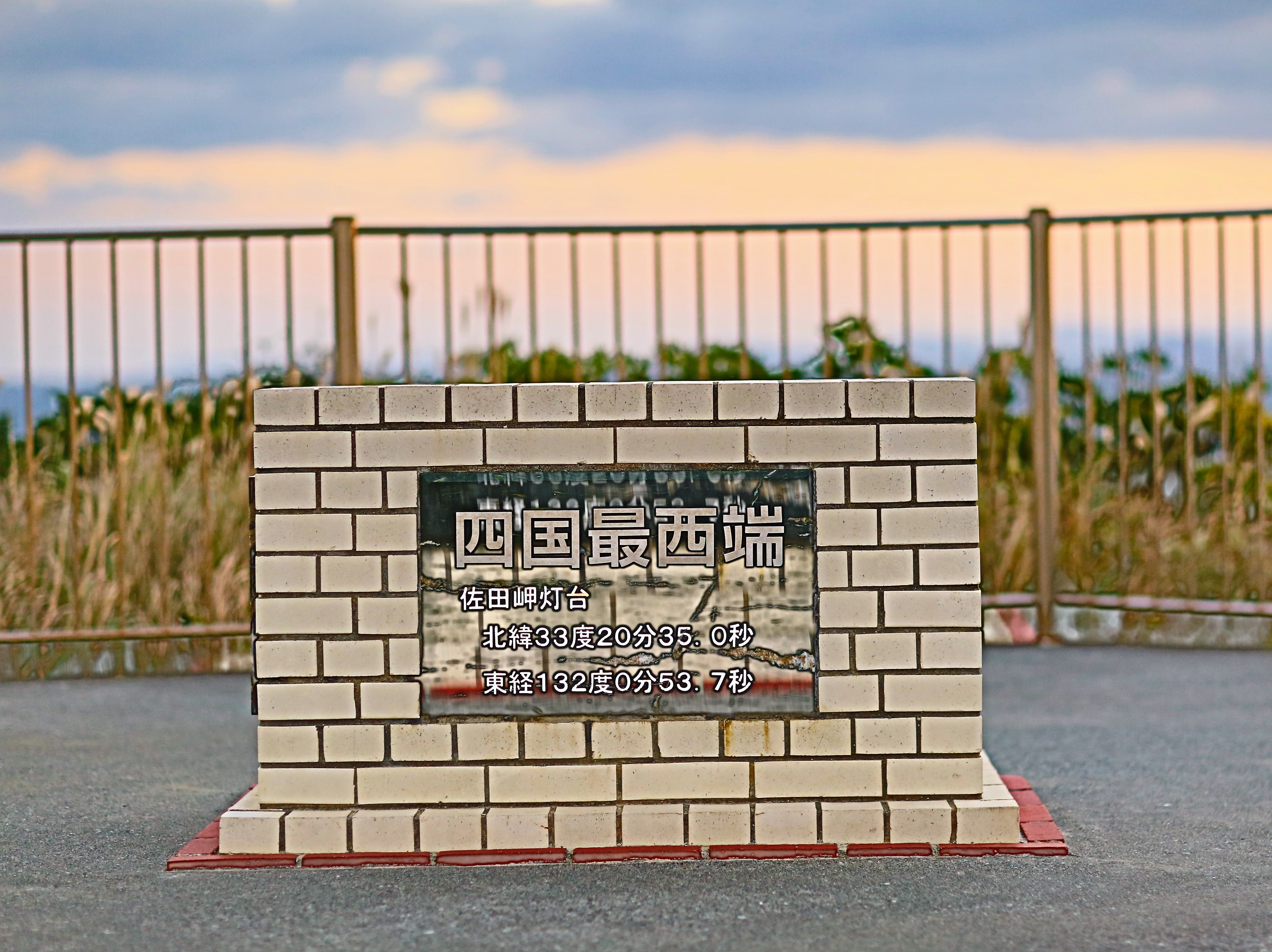 佐田岬灯台近くに設置してある四国最西端の碑